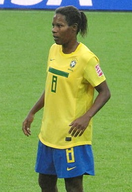 Miraildes Maciel Mota dite Formiga - Match de phase de groupes de la coupe du monde entre le Brésil et la Norvège le 3 juillet 2011 à Wolfsbourg